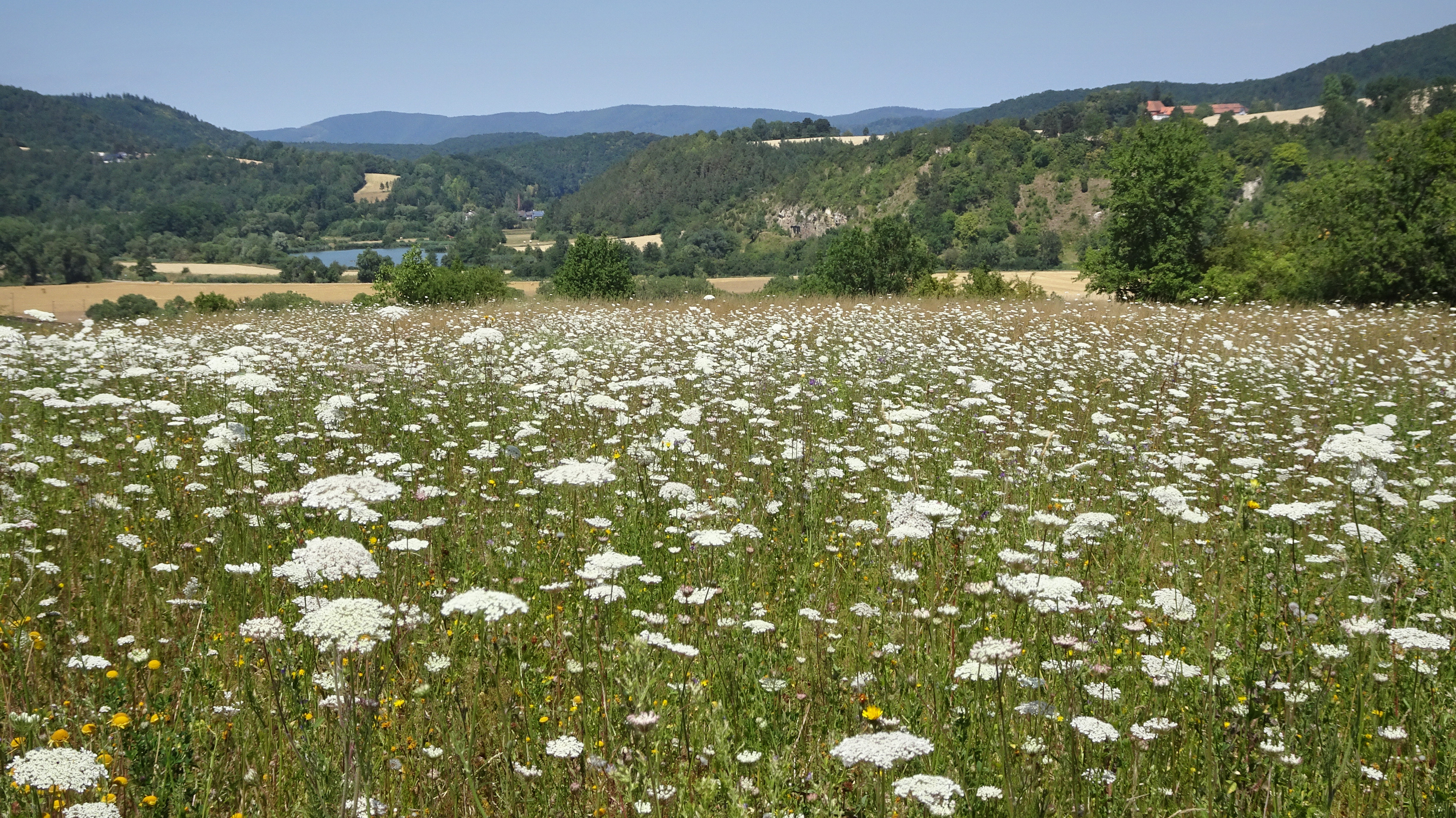 Der „Jestädter Weinberg“ ist ein Zechsteinrücken am rechten Werraufer im nordhessischen Werra-Meißner-Kreis, dessen sichtbare Dolomitfelsen landschaftsprägend sind. Bereits in 1924 wurden in einer ersten Schutzverordnung sämtliche Felspartien als Naturdenkmale ausgewiesen. Seit 1979 ist der Bereich ein Naturschutzgebiet und seit 2008 mit dem benachbarten Naturschutzgebiet „Werraaltarm und Werraaue bei Albungen“ als ein Fauna-Flora-Habitat-Gebiet Teil des europäisch vernetzten Schutzgebietssystems Natura 2000.